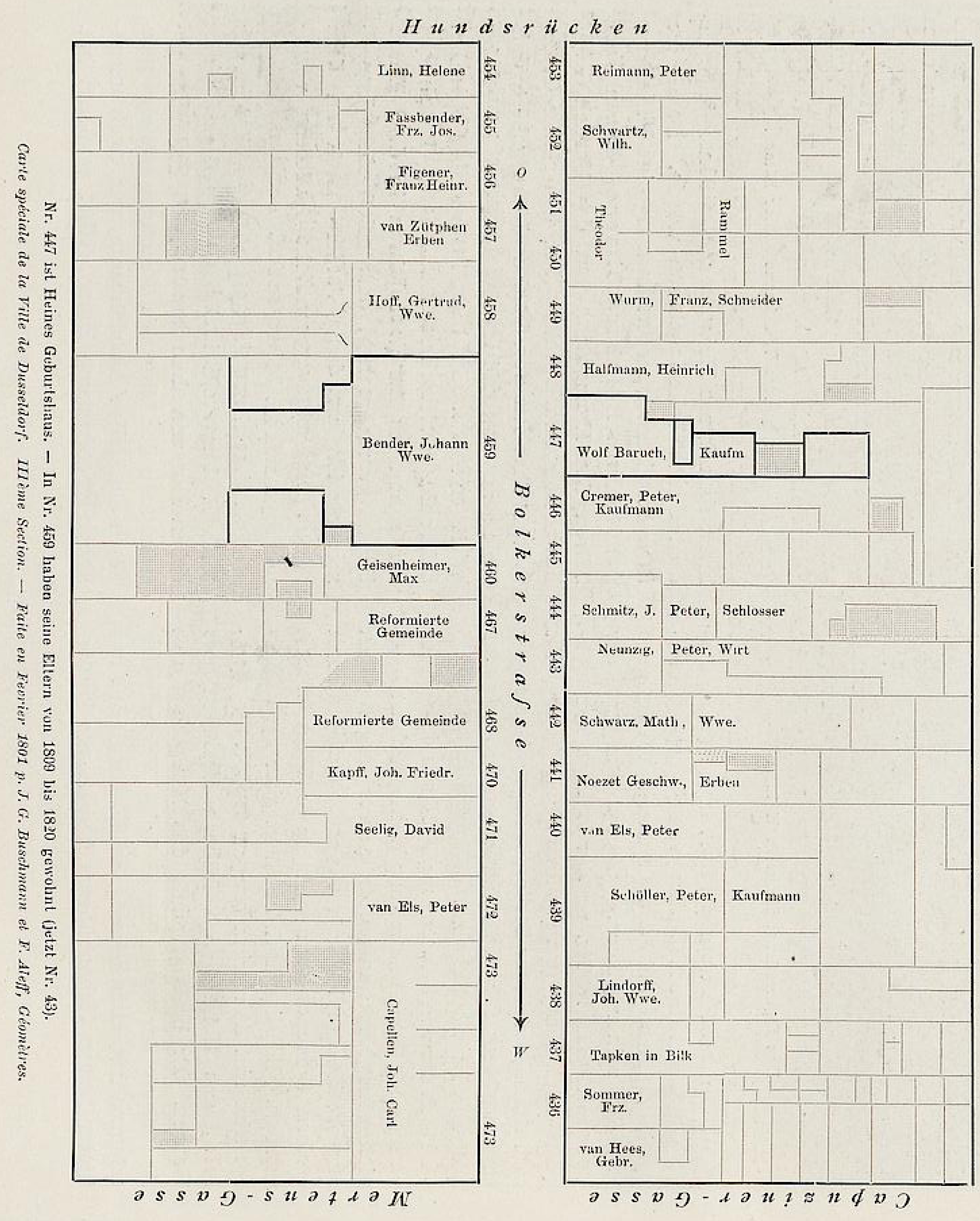 Plan der Bolkerstraße, Februar 1801: Nr. 447 ist Heines Geburtshaus (heute Nr. 53), in Nr. 459 haben seine Eltern von 1809 bis 1820 gewohnt (in 1901 die Nr. 43)